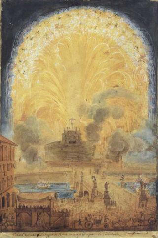 La girandola a Castel Sant' Angelo (Pencil and Watercolor)